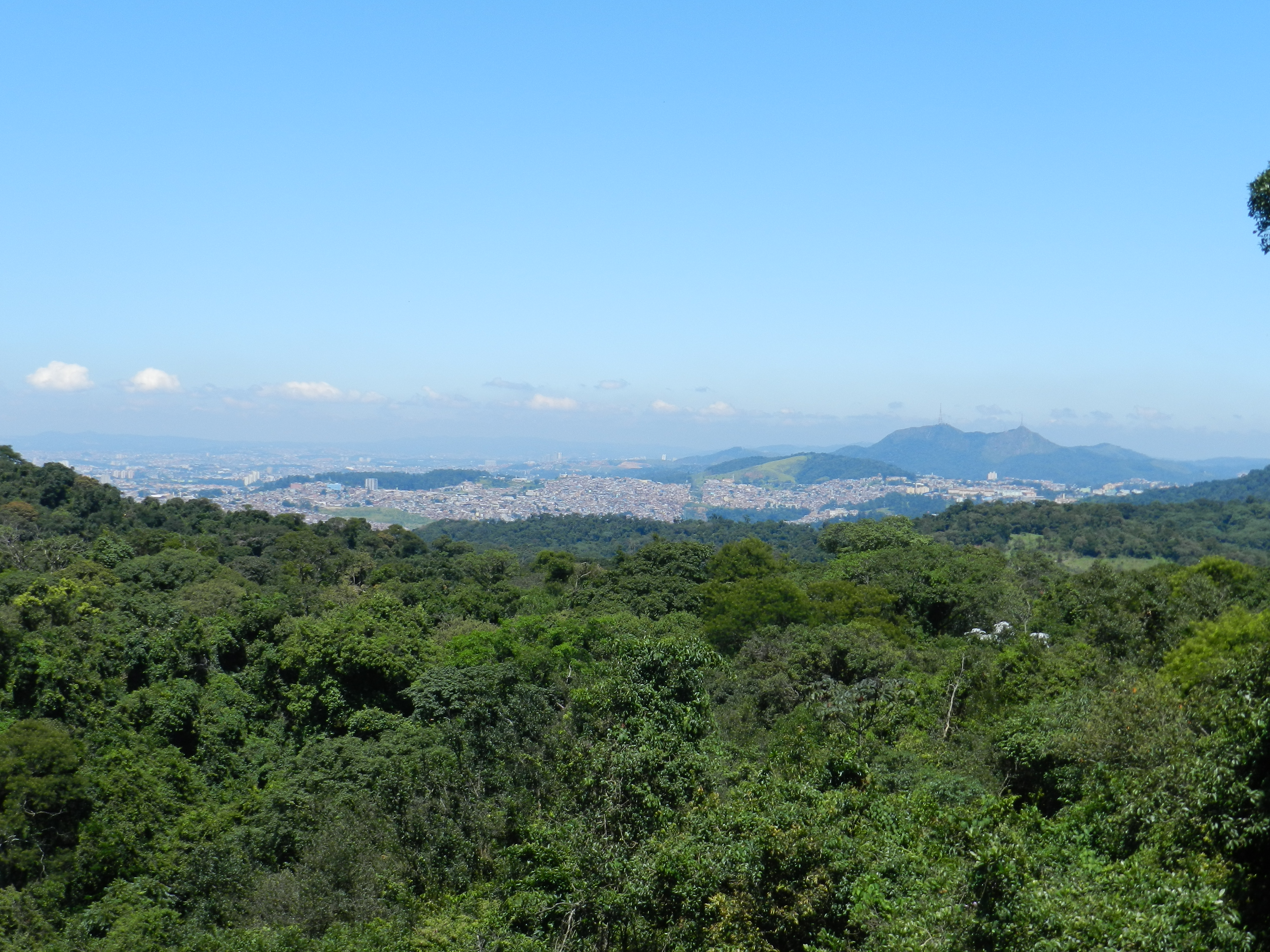 Vista da Cidade de São Paulo a partir da Pedra Grande